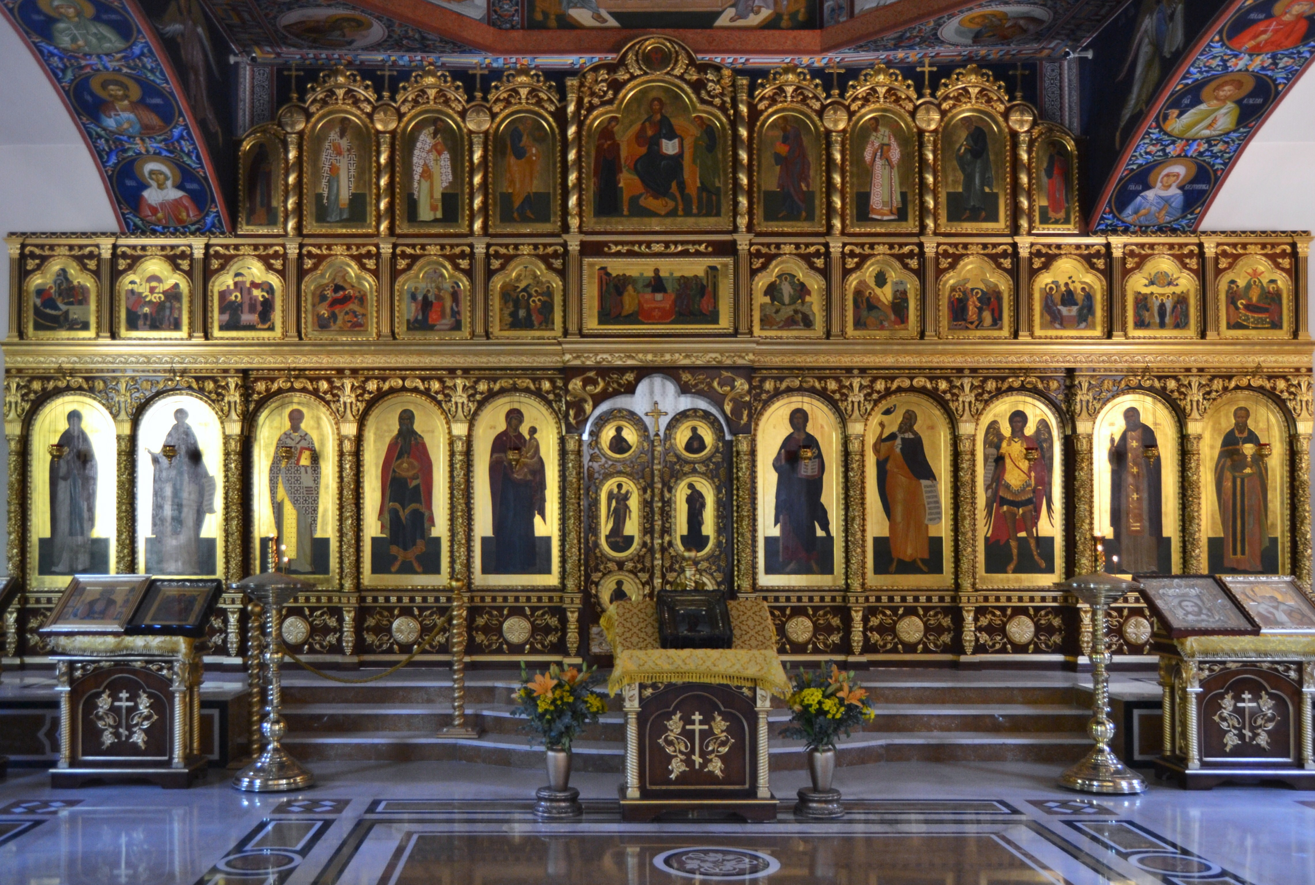 Iconòstasi de l'església de sant Miquel arcàngel, Altea.